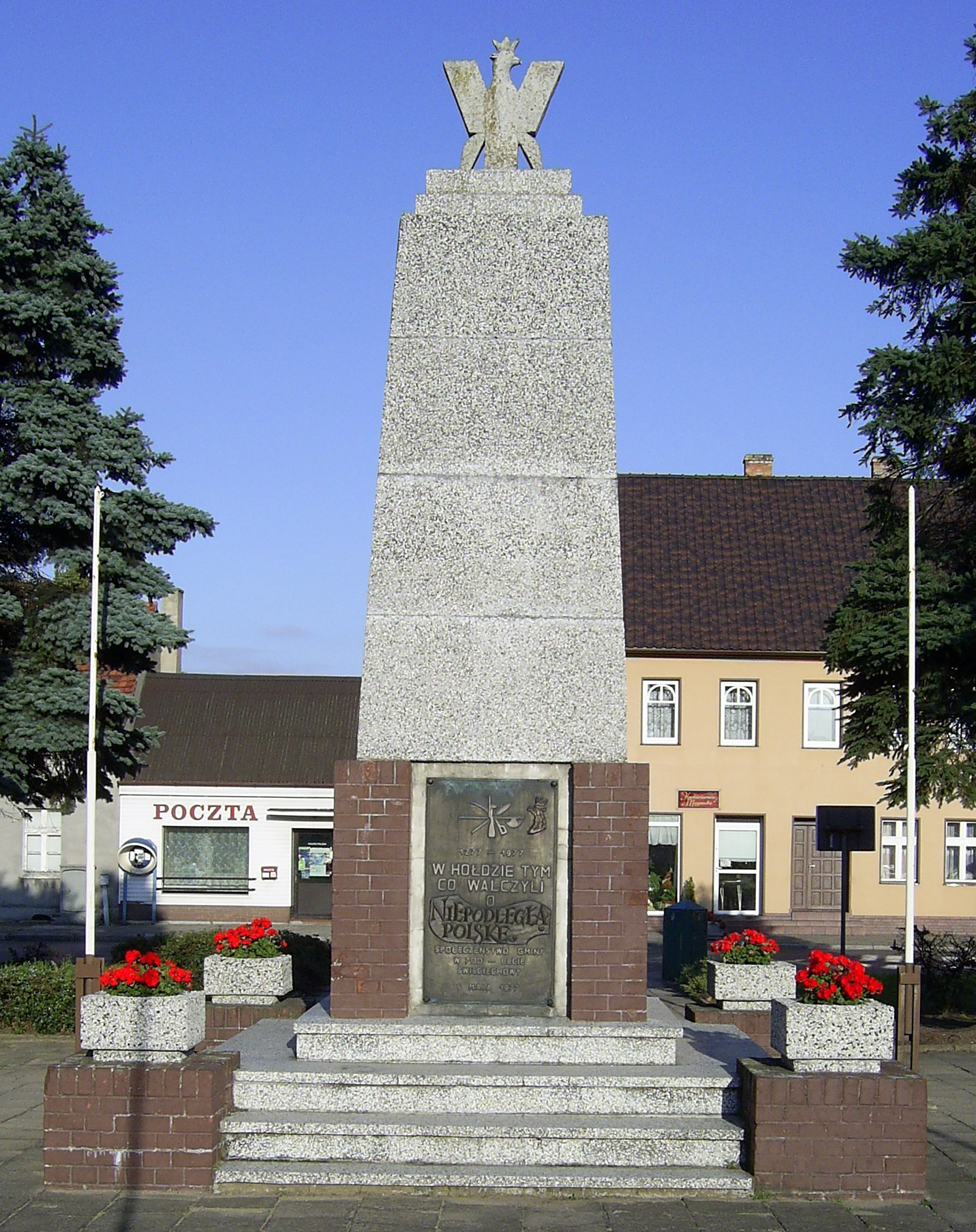 Erinnerungstafel anlässlich des 700-jährigen Bestehens von Święciechowa. Übersetzung des Textes: 1277-1977 zur Huldigung derer die für ein unabhängiges Polen kämpften. Die Einwohner der Gemeinde zum 700-jährigen Bestehen Święciechowas, 5. Mai 1977.